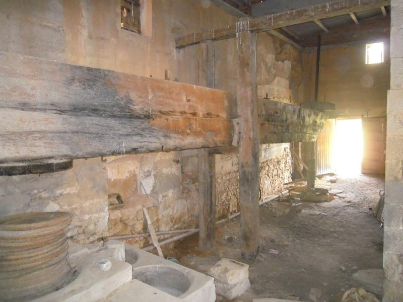 Premsa de seixantè, d'uns deu metres de longitud, situada al Molí del Bep de Canut (Torrebesses).